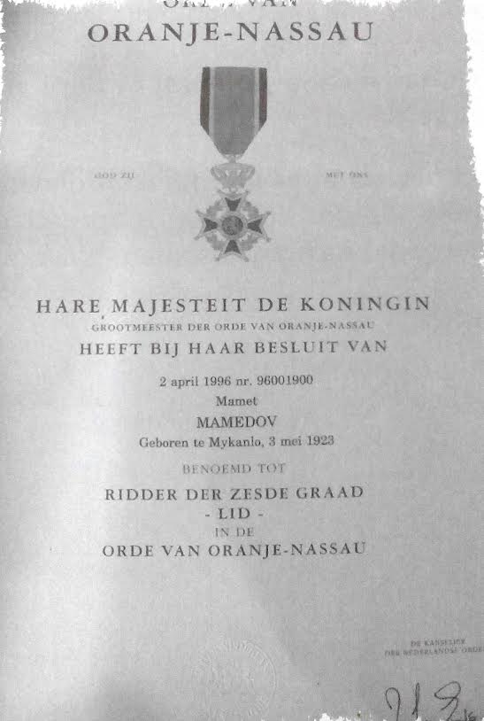 2 april 1996 nr. 96001900 Mamet Mamedov. Geboren te Mykanlo, 3 mel 1923 Benoemd Tot Ridder Der Zesde Graad Lid In de Orde Van Oranje-Nassau